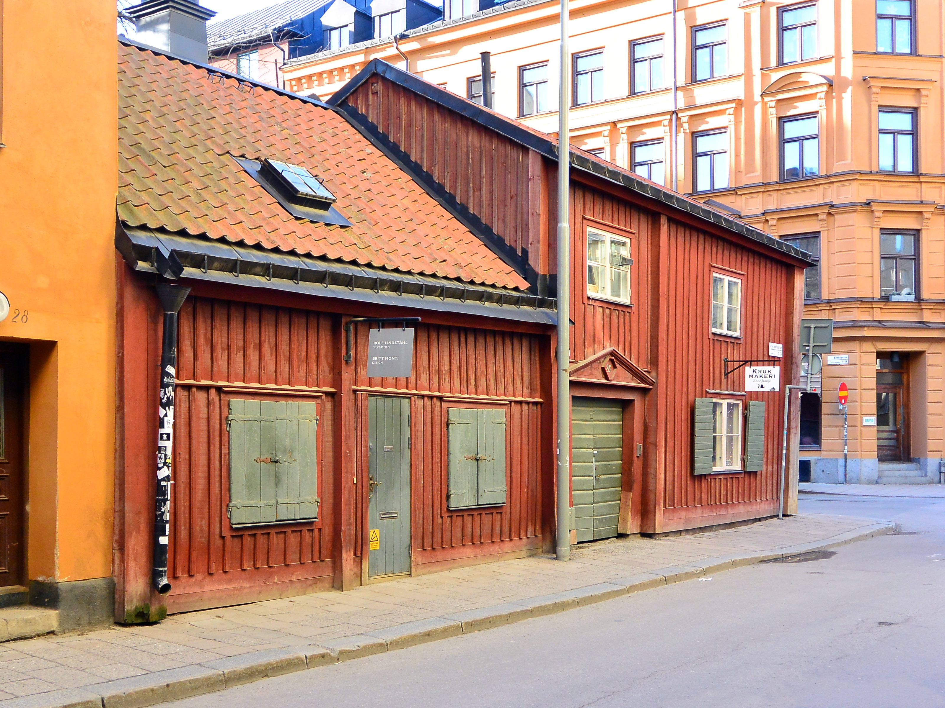 En av Södermalms kvarvarande träkåkar i hörnet Bondegatan–Södermannagatan.